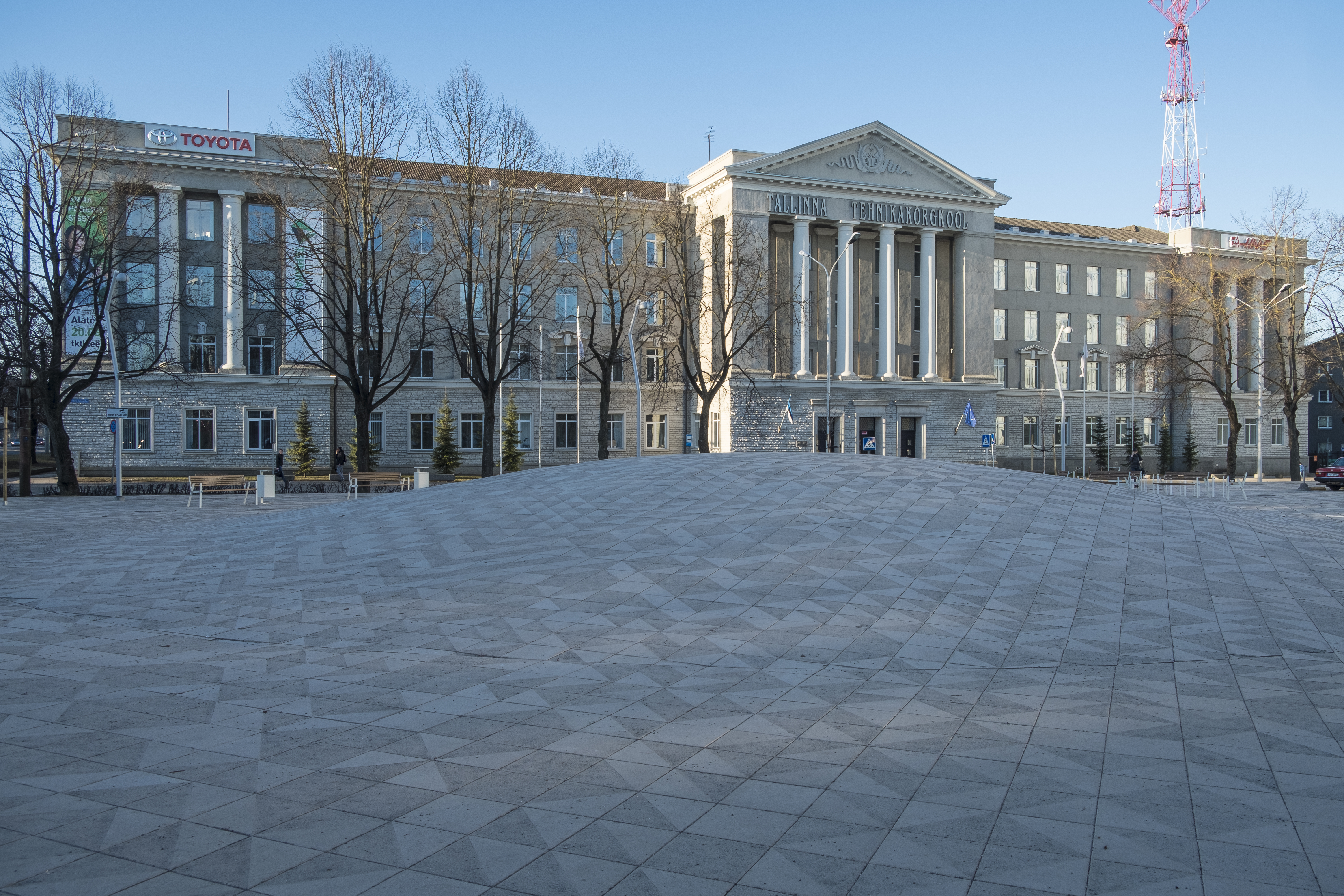 Tallinna Tehnikakõrgkool